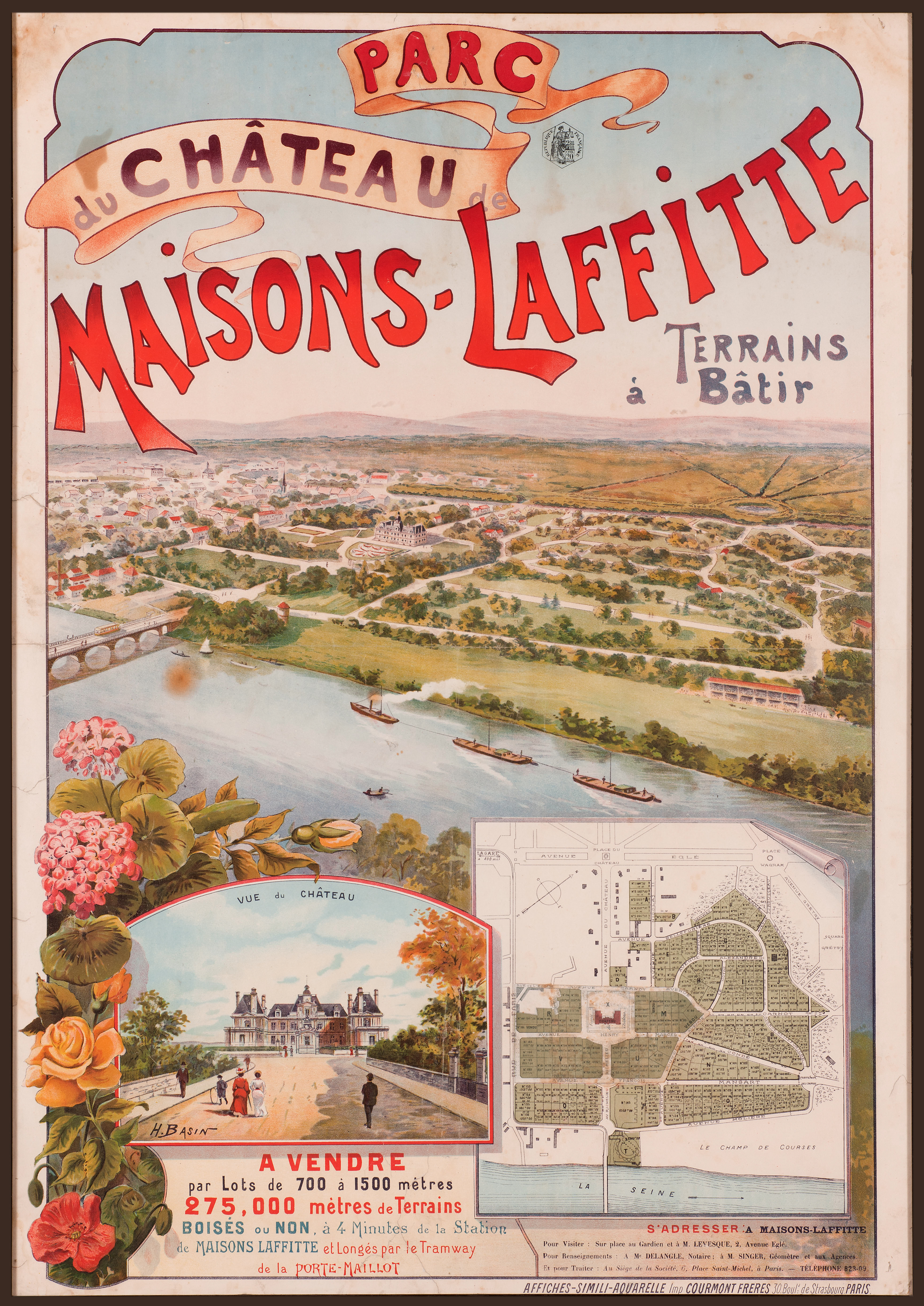 Affiche faisant la promotion du lotissement d'une partie du domaine de Maisons : vue à vol d'oiseau de la Seine, du château et du village ; à gauche réserve avec la vue du château du côté de l'avenue ; à droite, réserve avec le plan du domaine de Maisons.